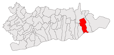 Categorie:Hărţi ale judeţului Călăraşi